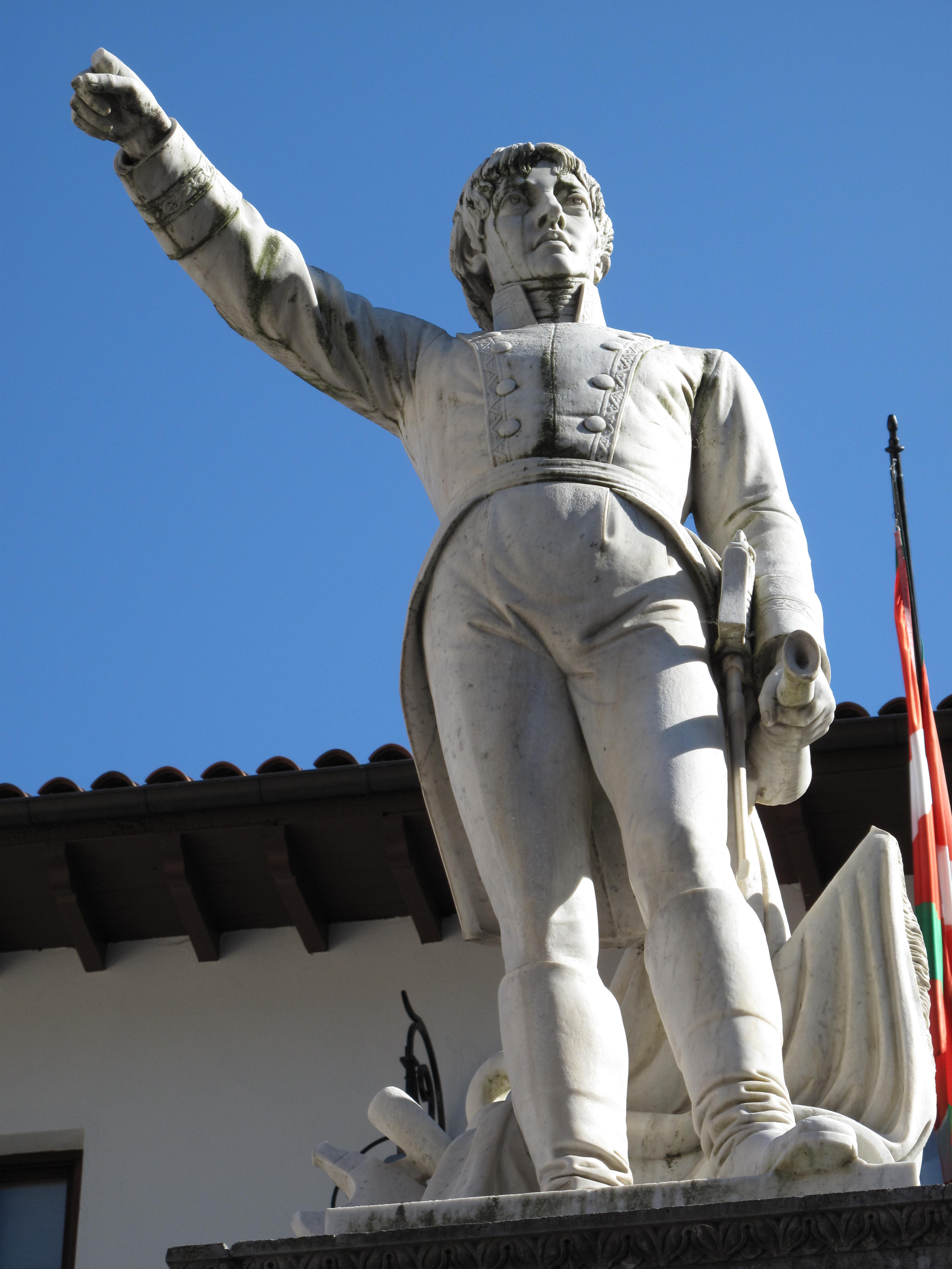 Mutriku (Guipúzcoa): Monumento a Cosme Damián Churruca. Marino vasco, muerto en la batalla de Trafalgar